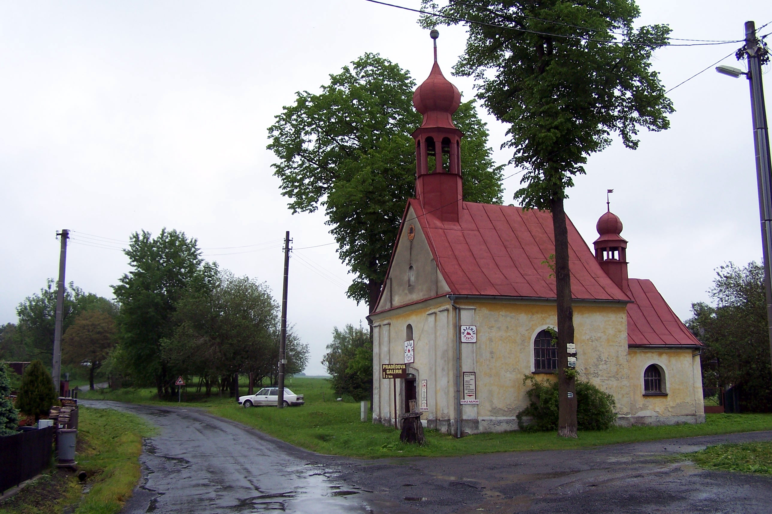 Kaple svatého Františka Xaverského ve vsi Křížov.